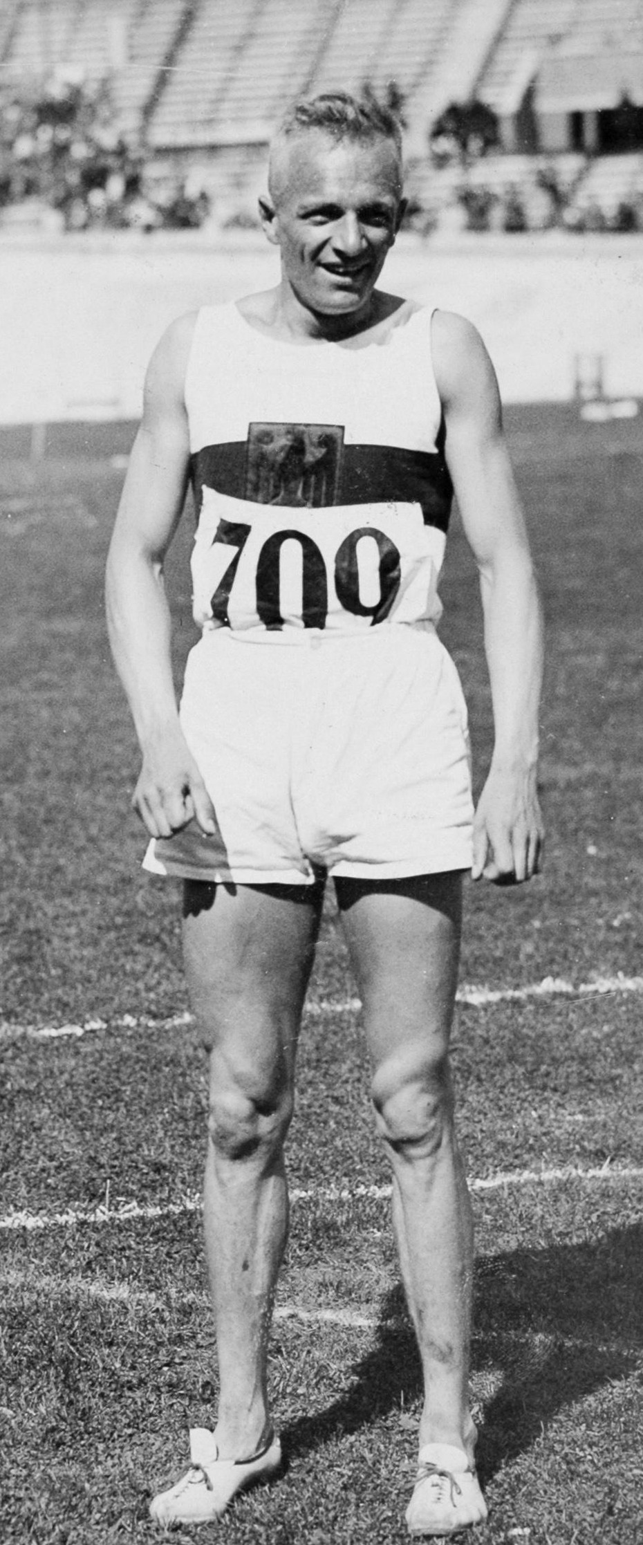 Sport. Sport, Olympische Spelen Amsterdam, 1928 : De Duitse atleet Hermann Engelhard, derde op de 800 meter hardlopen (mannen).